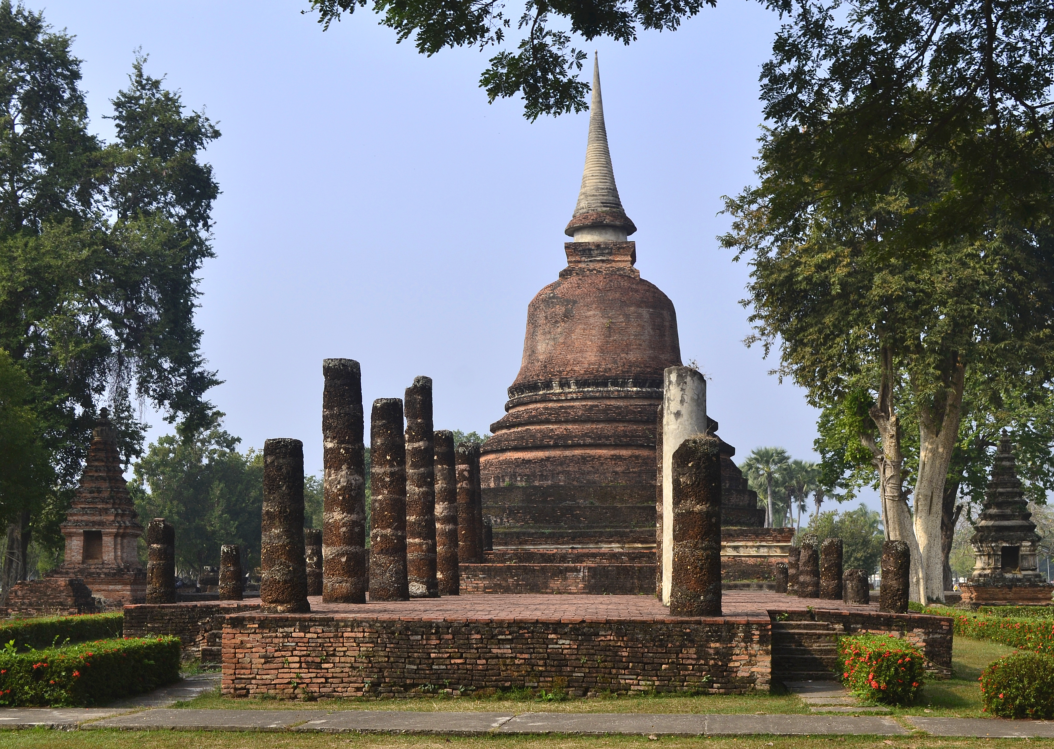 Wat Chang Songkhram im Geschichtspark Sukhothai. Blickrichtung West: Viharn vor Chedi.